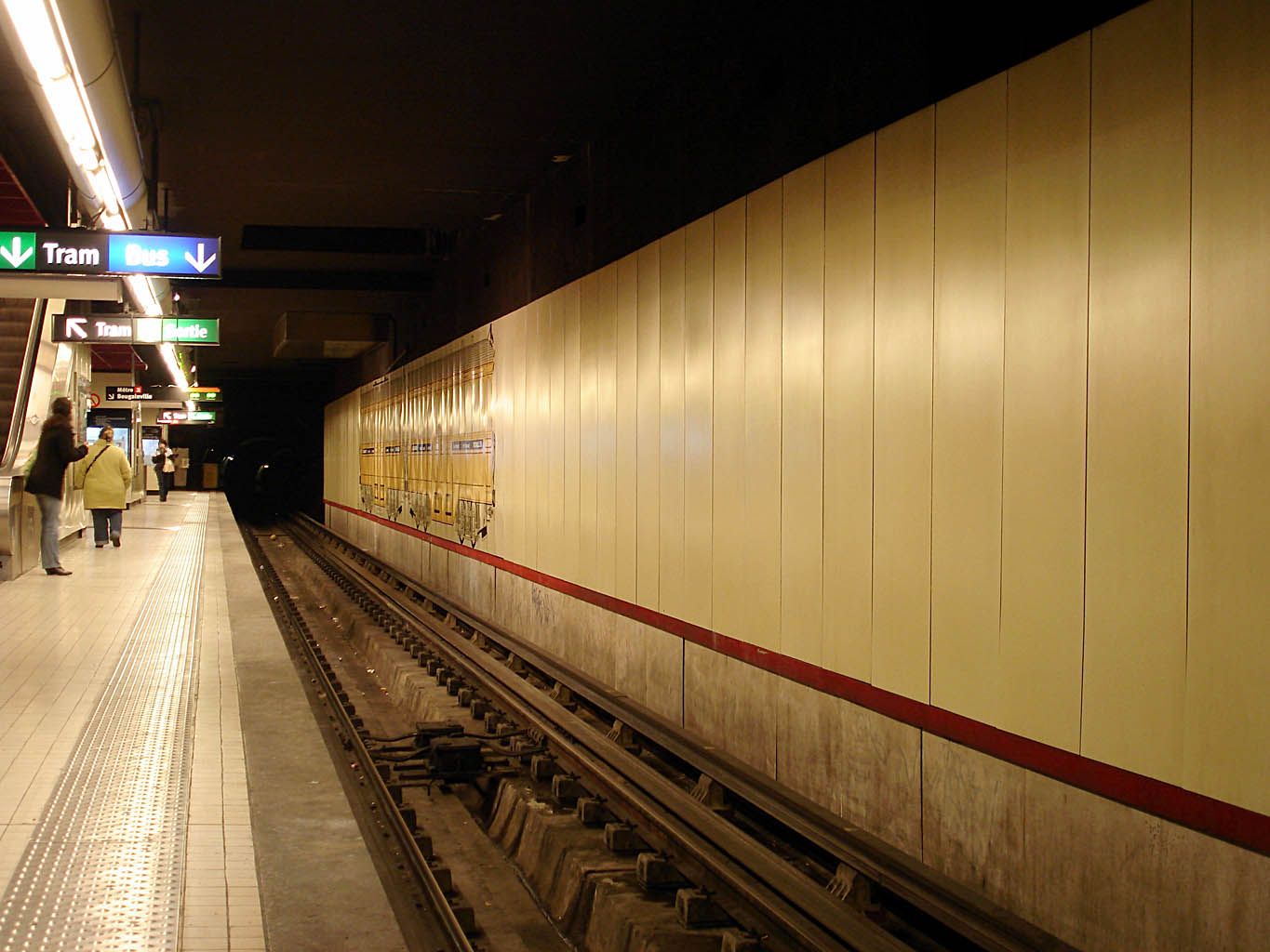 Station Noailles du métro de Marseille, France.